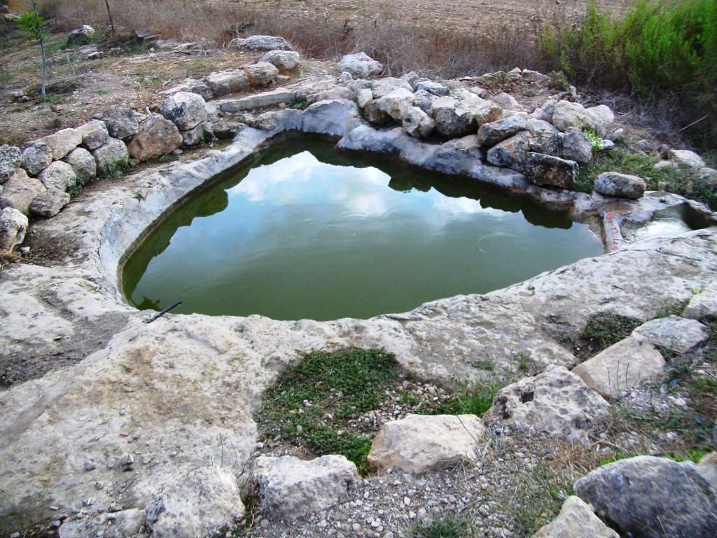 הבריכה הנמוכה במעיין מאיר